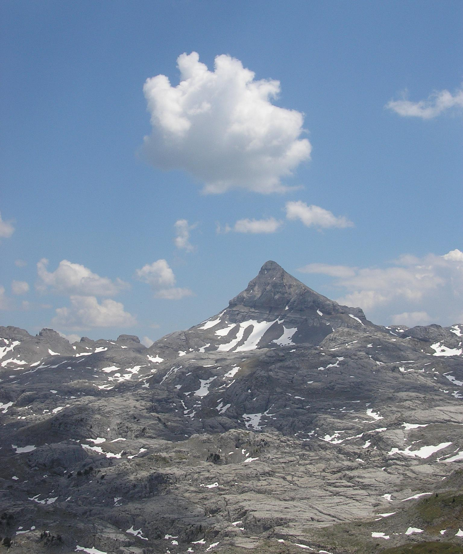 Пик Ани с вершины пика Арлас